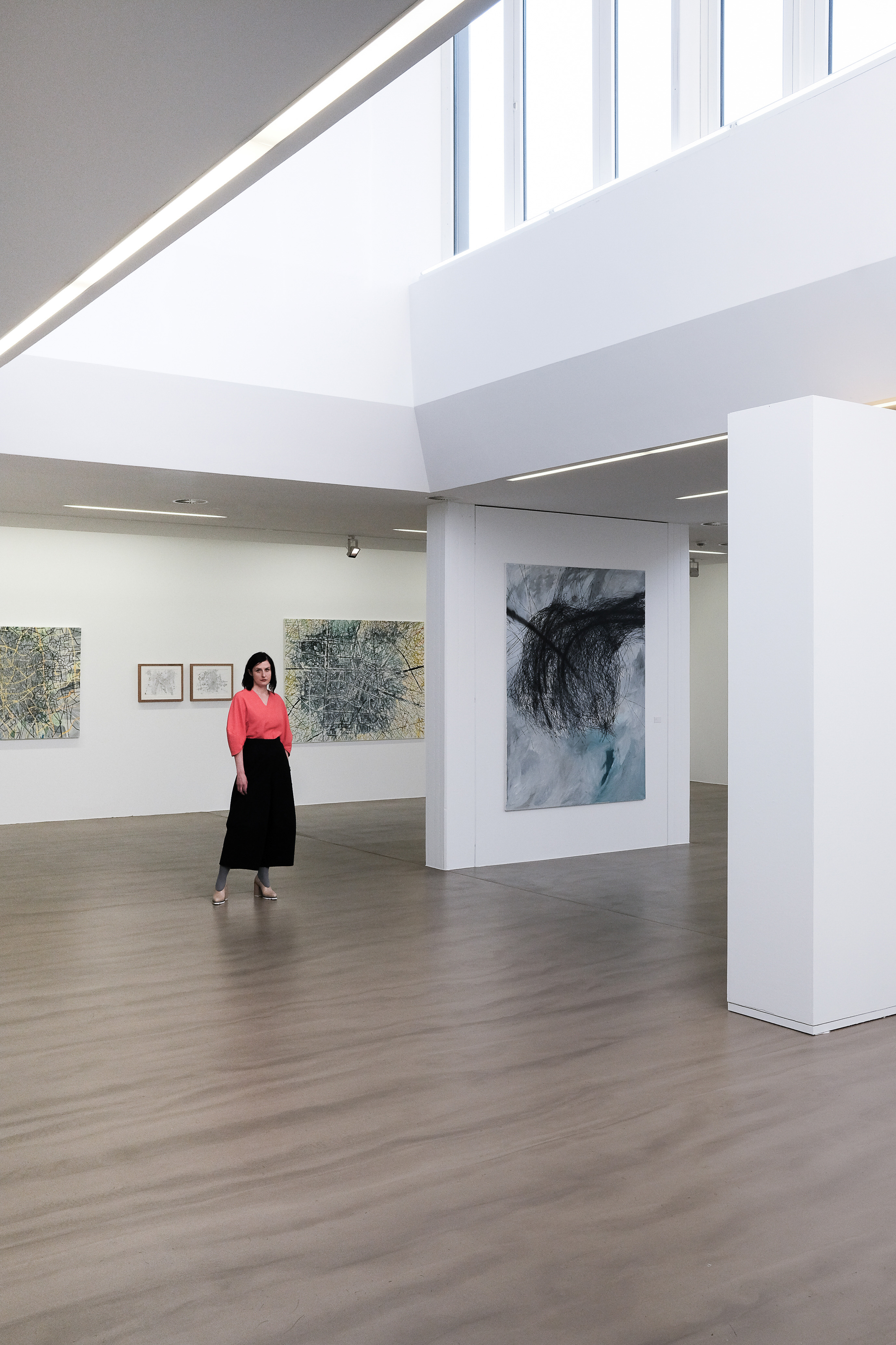 Renata Jaworska stellt im Museum Ratingen aus 2018